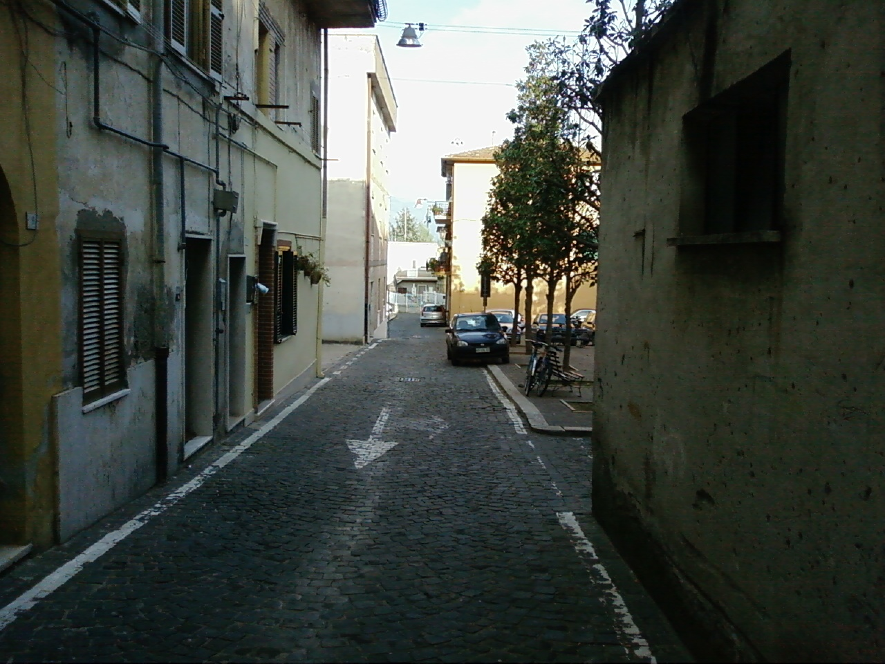 Un vicolo di Cisterna Vecchia